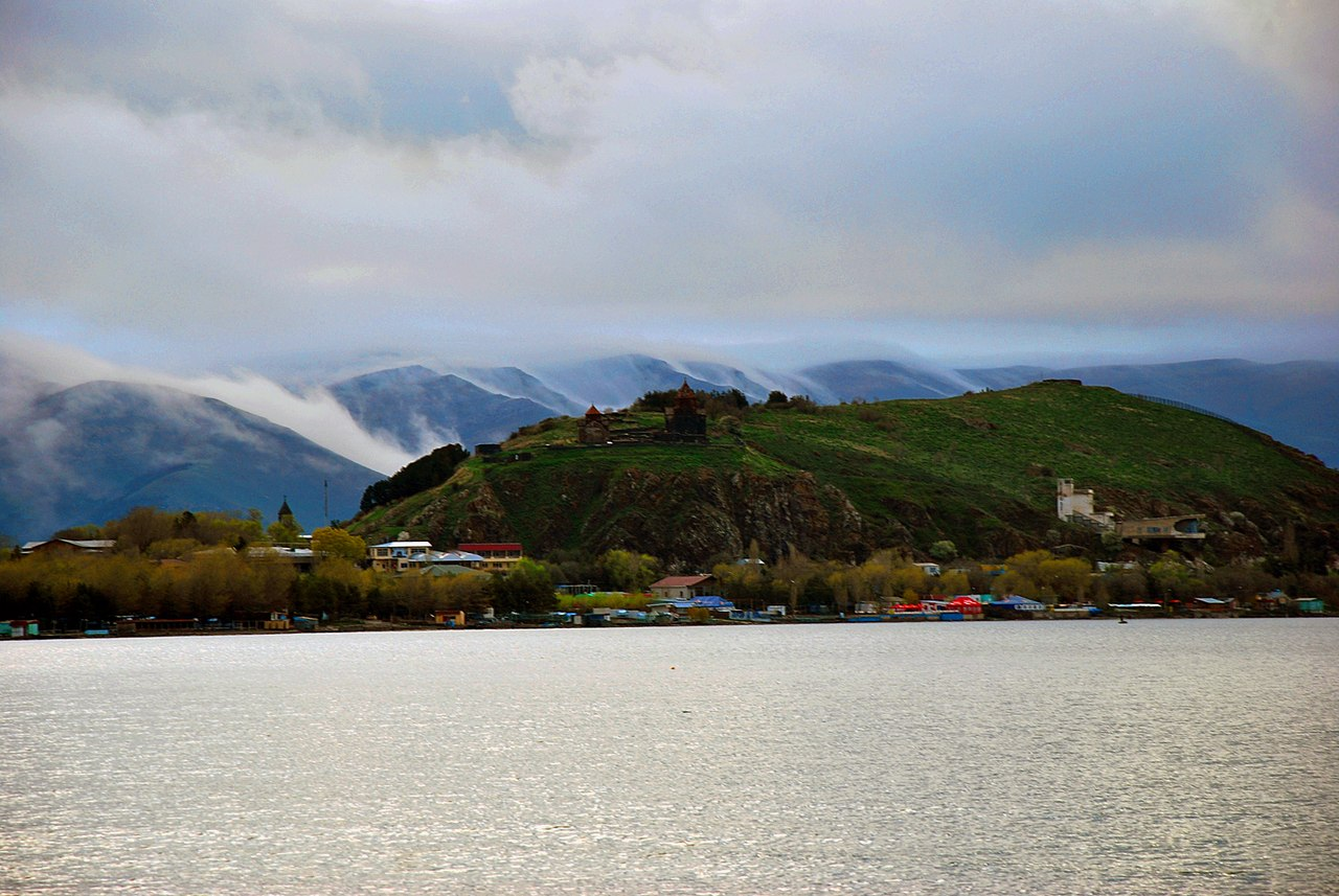 Севанский полуостров